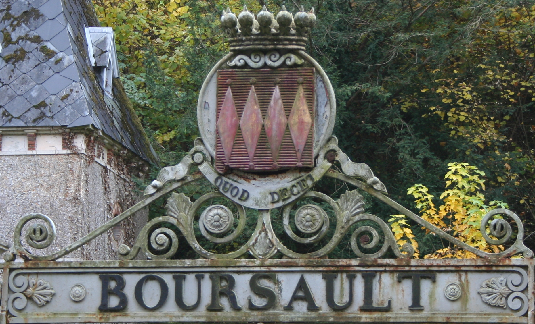 Armoirie de Boursault (19e s.)